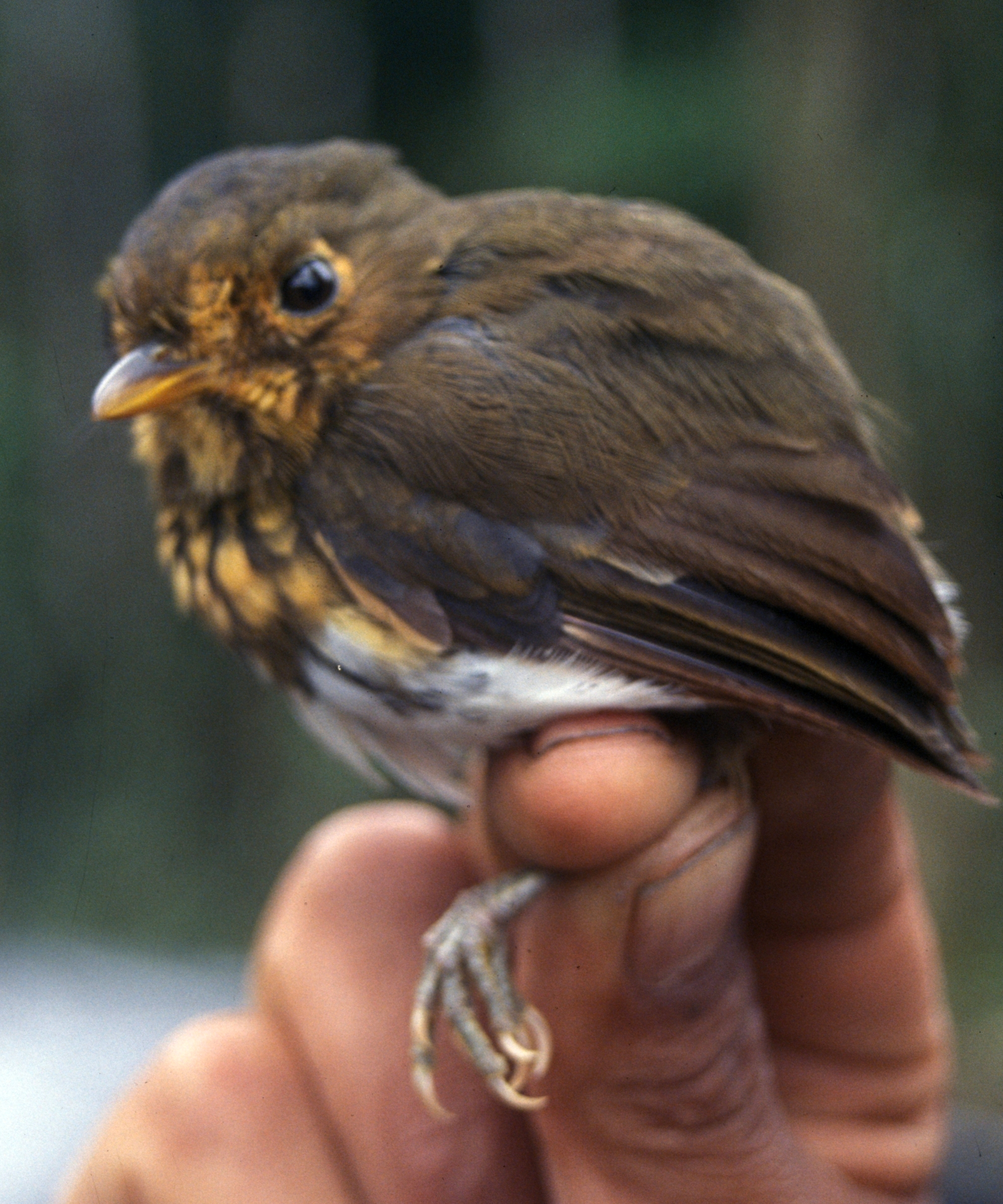 Ochre-breasted Antpitta (Grallaricula flavirostris). From Cordillera del Cóndor, Ecuador.